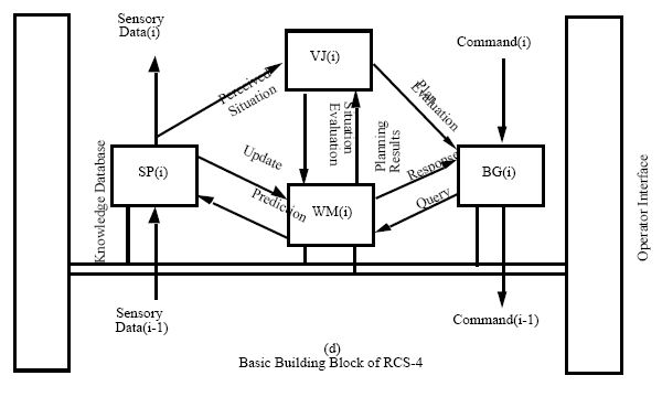 RCS-4 control paradigm